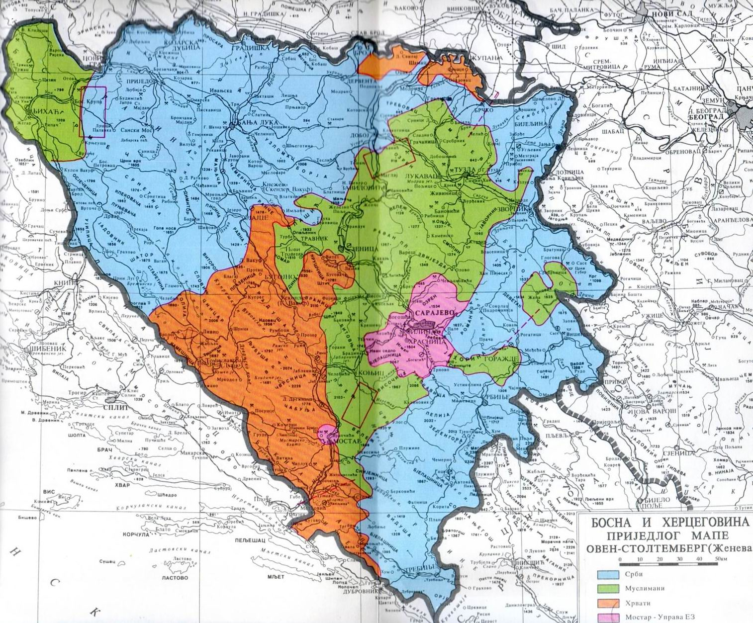 Босния и Герцеговина по плану Овена Столтемберга